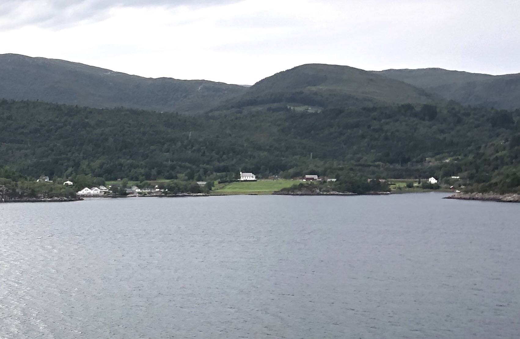 Totland am Nordfjord